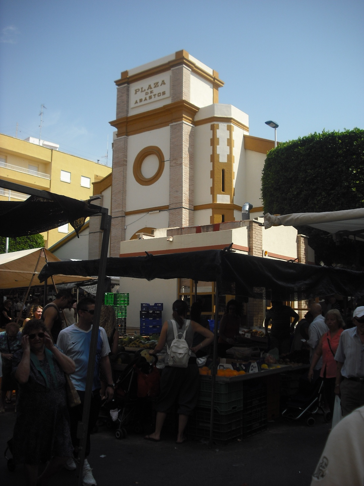 Mercat de Santa Pola.